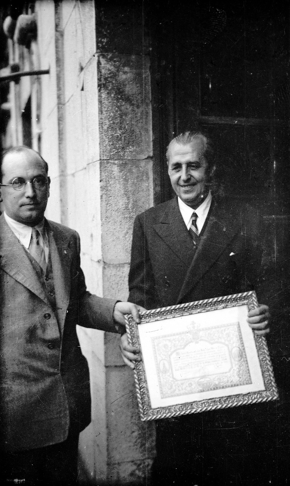 Homenaje al Director General de Arquitectura D. Pedro Muguruza y al Dr. Arrillaga